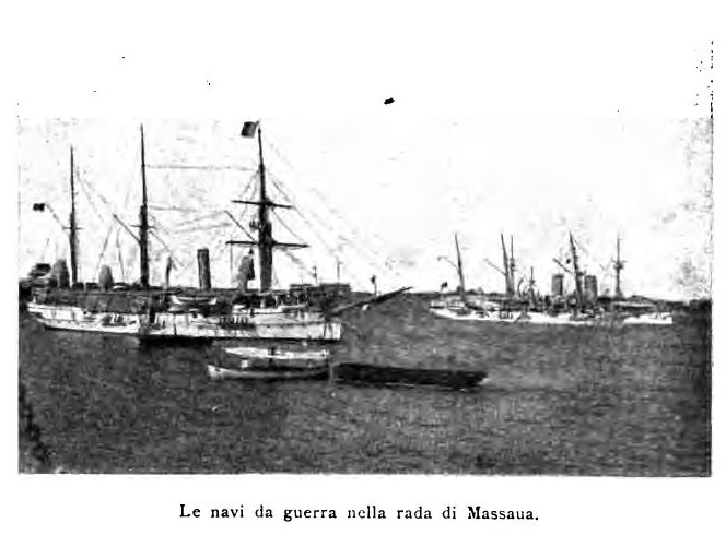 Le navi da guerra nella rada di Massaua